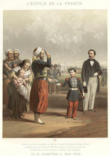 Pendant une de ses promenades au Camp de Châlons Son Altesse le Prince Impérial accompagné de son précepteur M.r Monnier, reçoit la pétition d'un Zouave : Le Prince avec sa bonté naturelle lui répond : Soyez tranquille ! Je la remettrai à mon père